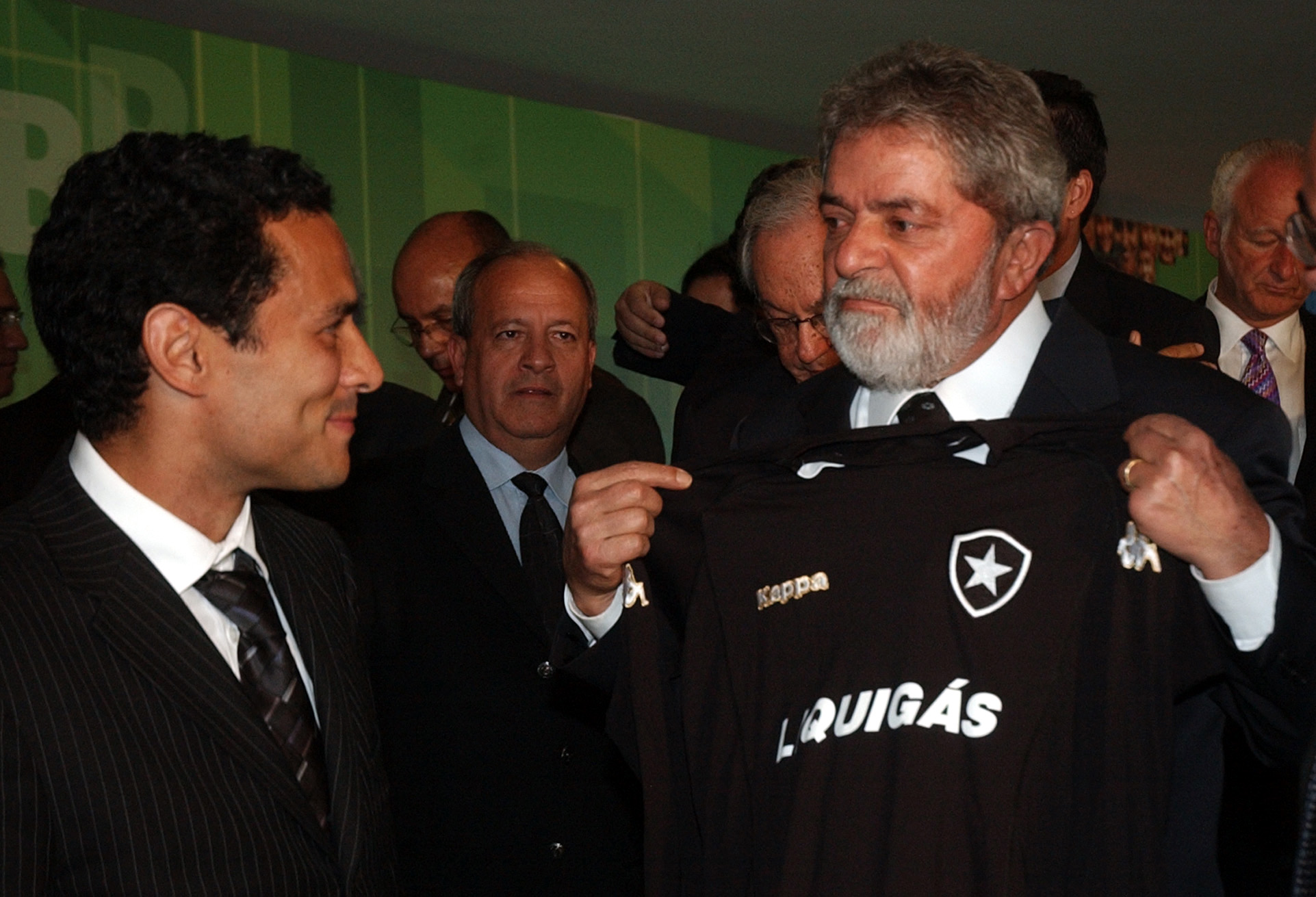 Brasília - O presidente Luiz Inácio Lula da Silva conversa com Túlio, jogador do Botafogo, durante cerimônia de assinatura do decreto que regulamenta a Timemania (Foto: Fabio Rodrigues Pozzebom/ABr)